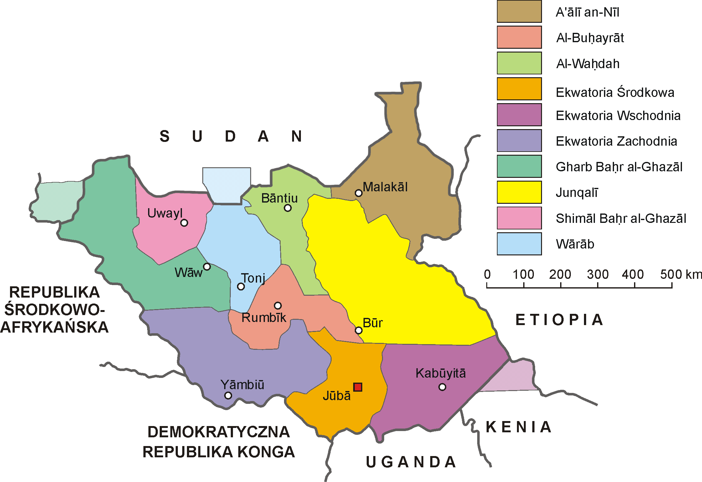 Mapa administracyjna Sudanu Południowego. Autor: Aotearoa